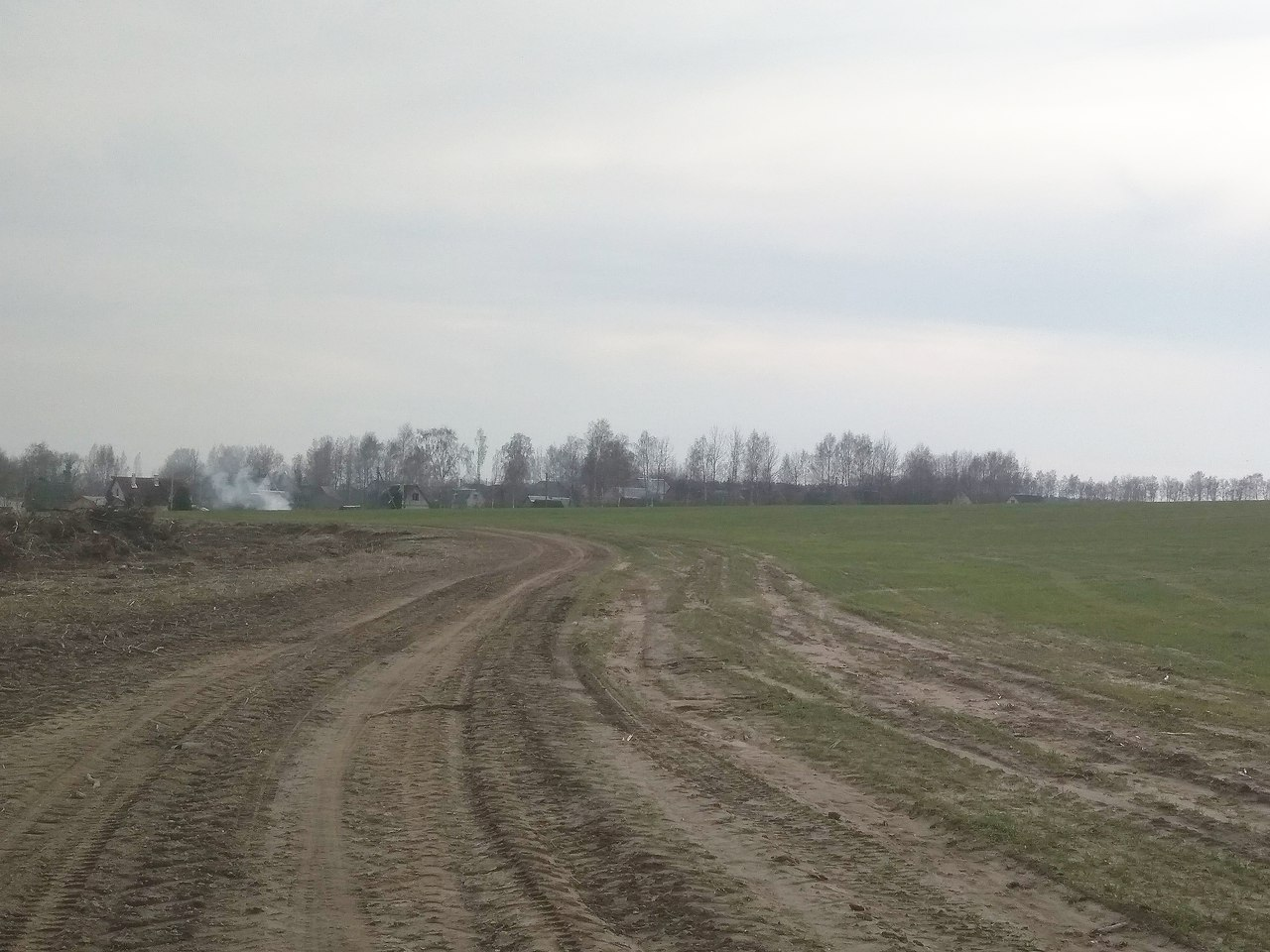 д. Вишнёвка, Боровской с/с, Дзержинский район, Минская область